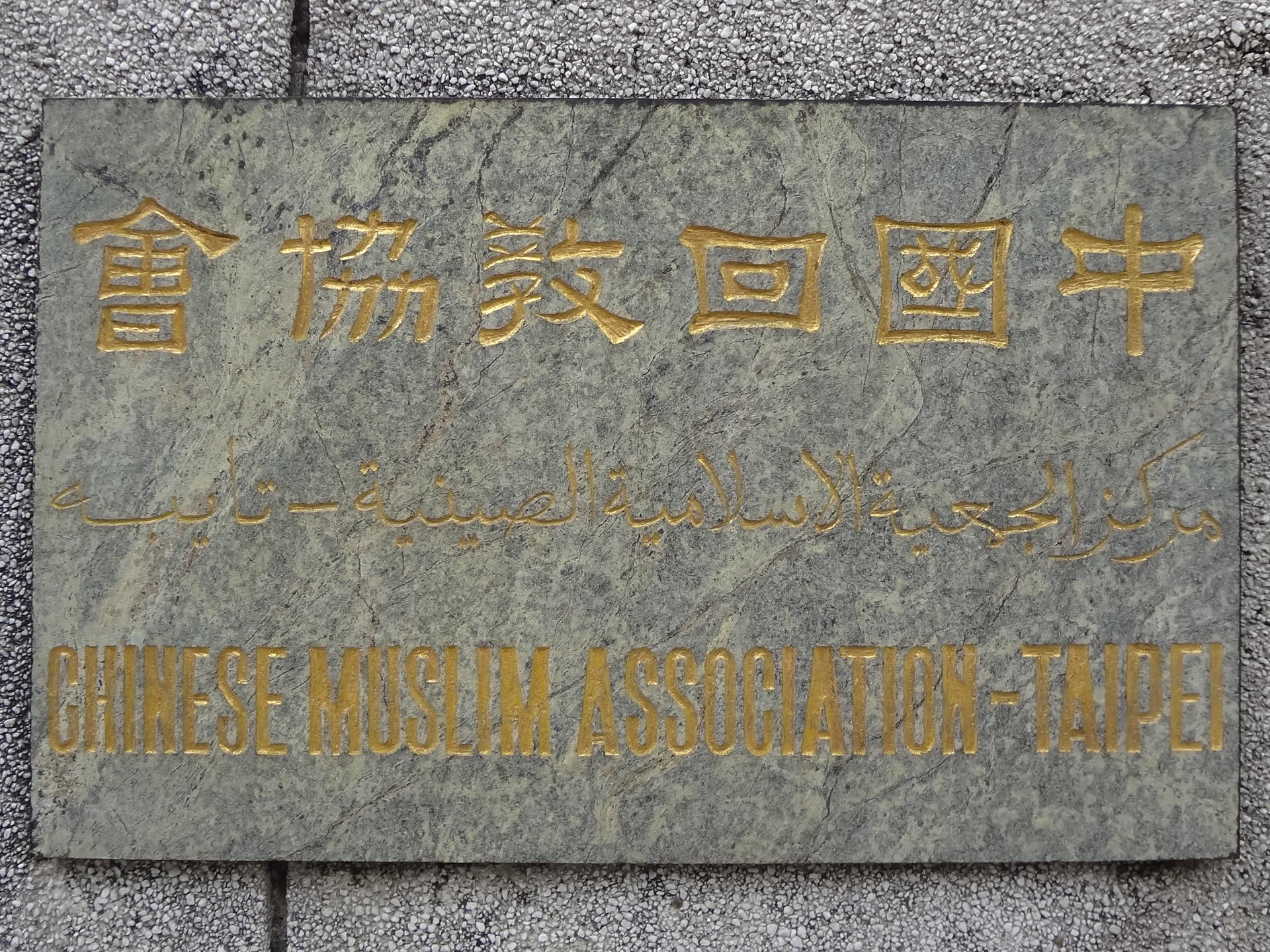 中國回教協會銘板，位於臺北清真寺圍牆。